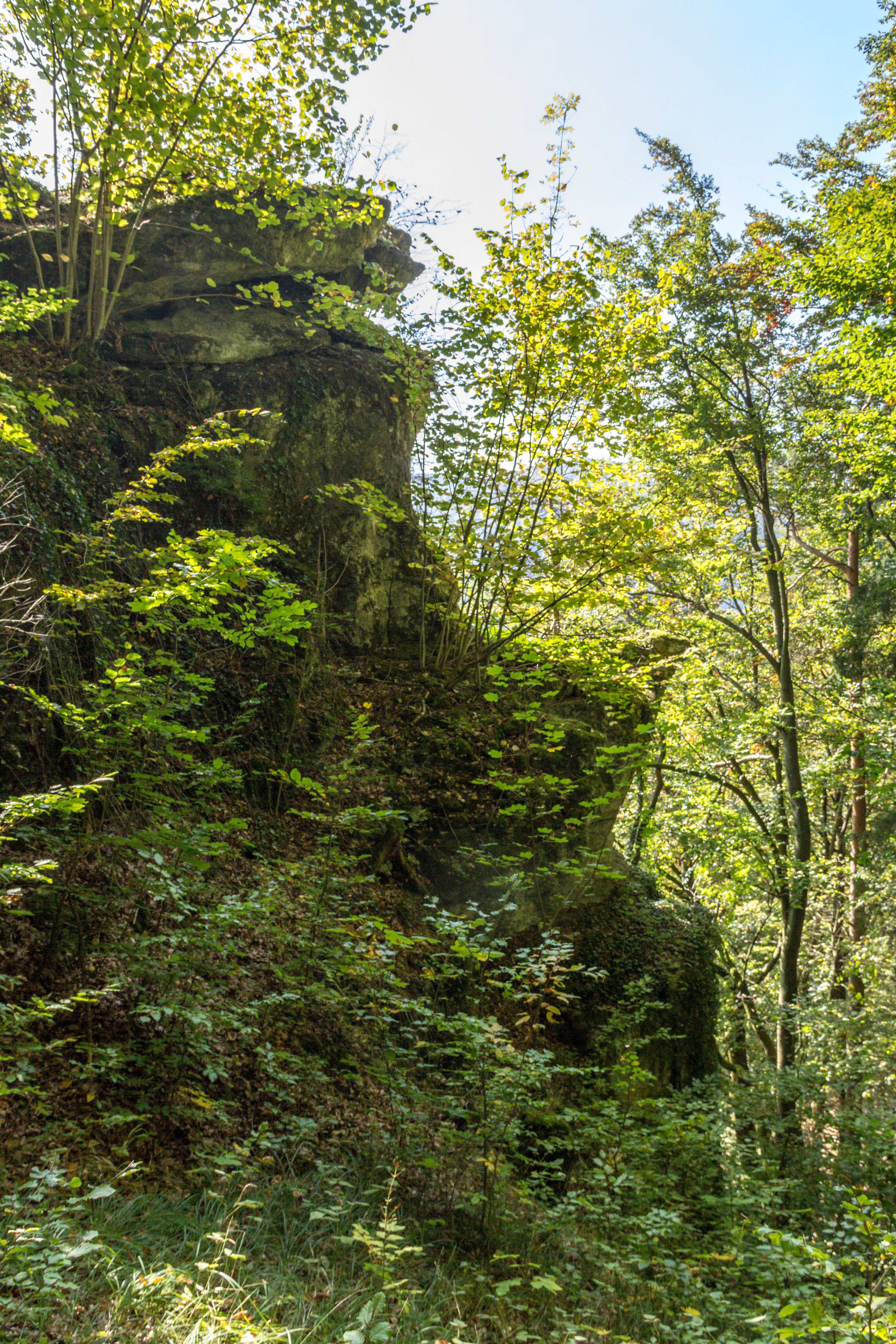 Teufelskanzel, Mittelburg, Happurg, Geotop, Felsburg